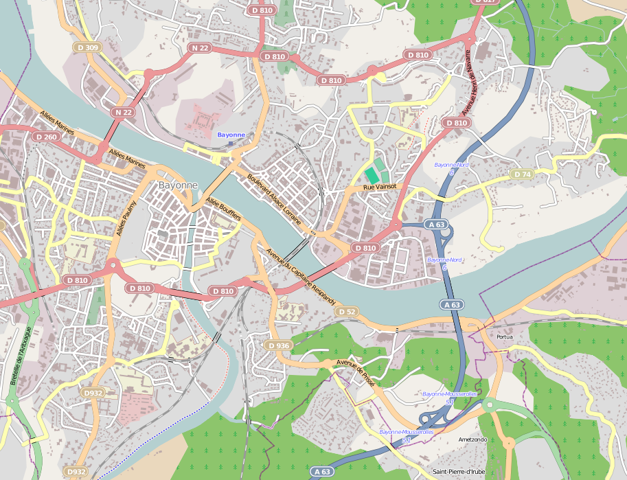 Baiona hiriaren erdiguneko kokapen mapa. Lapurdi, Euskal Herria. - Location map of Bayonne. Labourd, Basque Country.